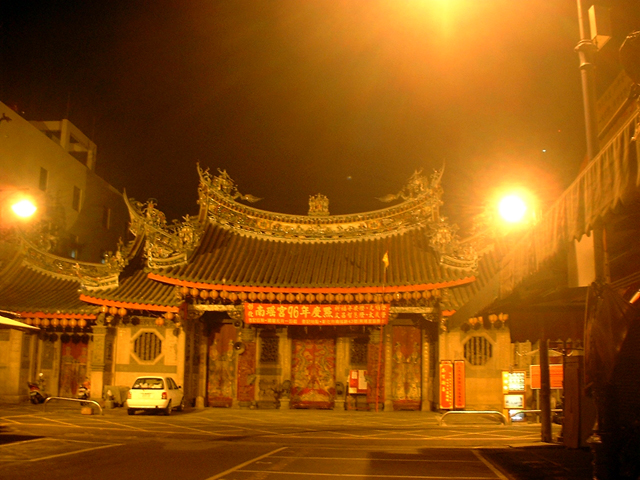 彰化南瑤宮夜景